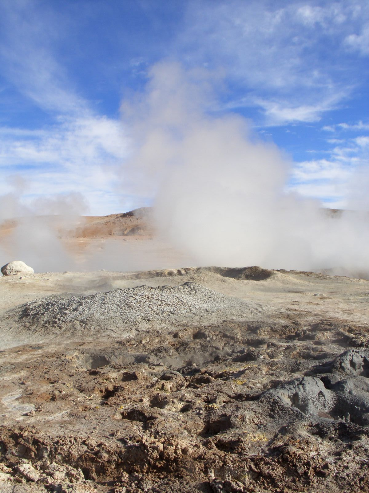 Vista de un géiser en la zona de "Sol de Mañana".